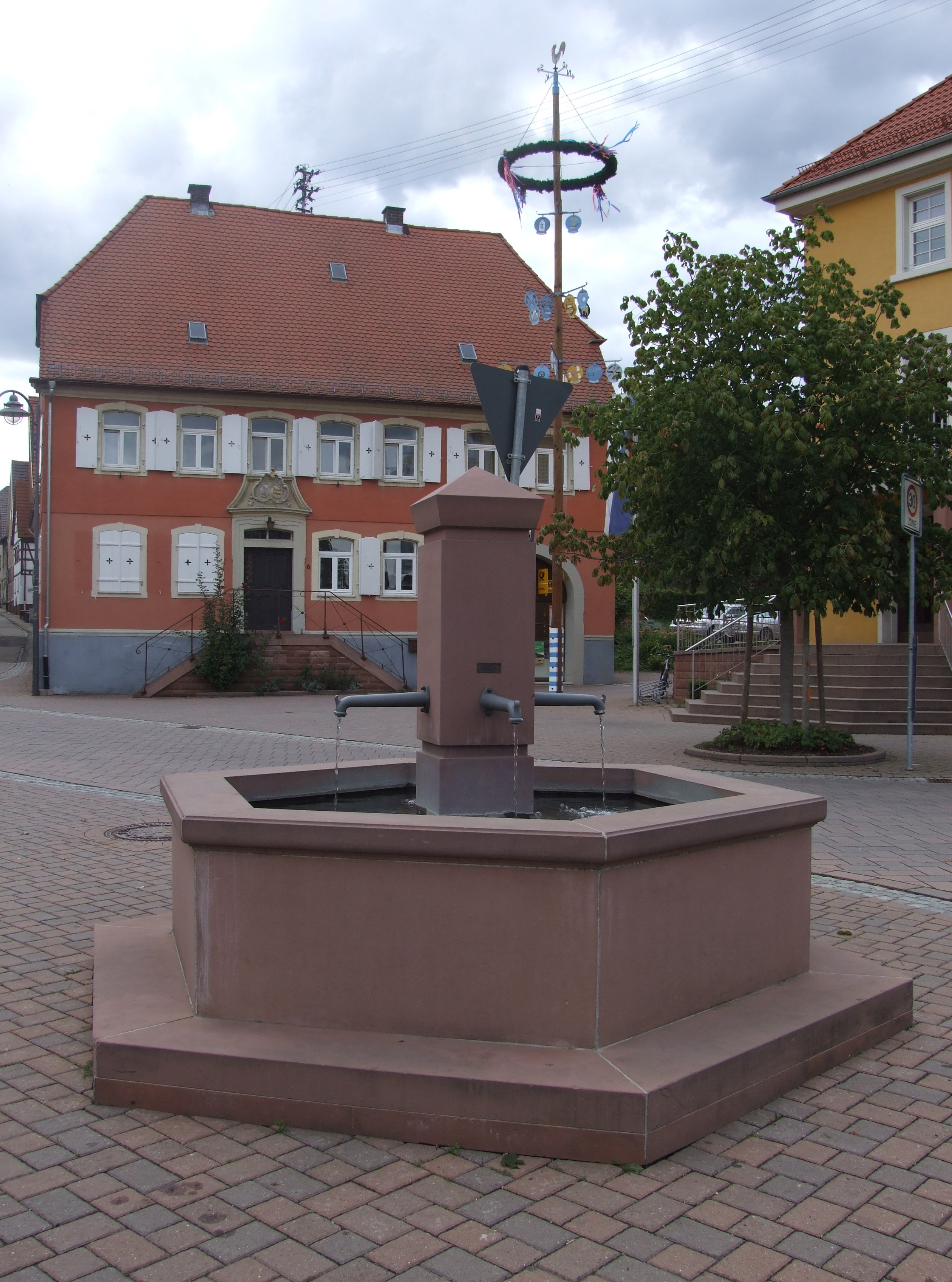 Brunnen am Marktplatz von Eschelbronn. Im Hintergrund das alte Pfarrhaus.